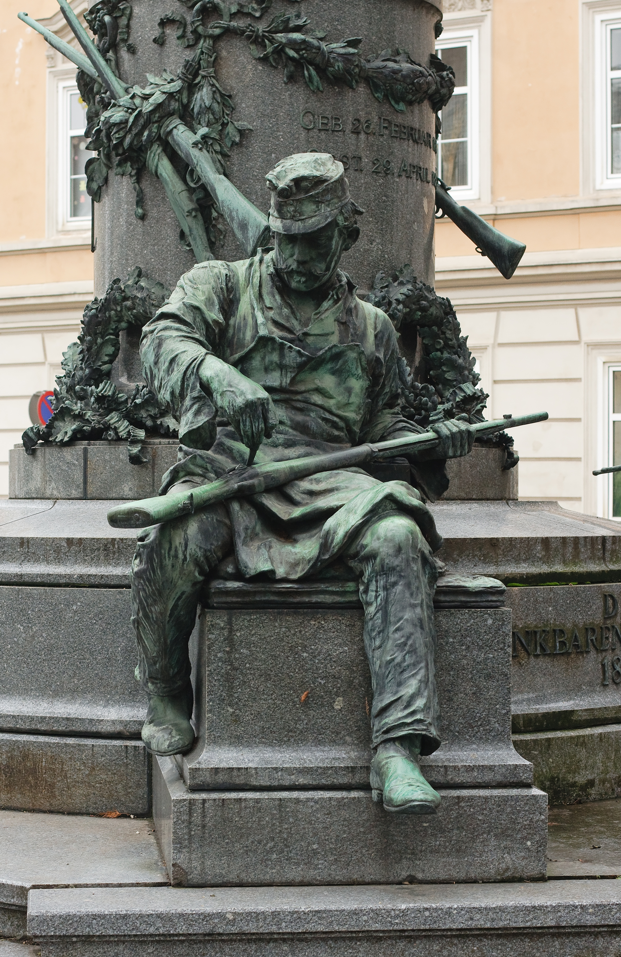 Teil des Steyrer Werndl-Denkmals: Bronzefigur eines Monteurs